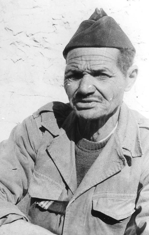 Un harki, vétéran de 39-45